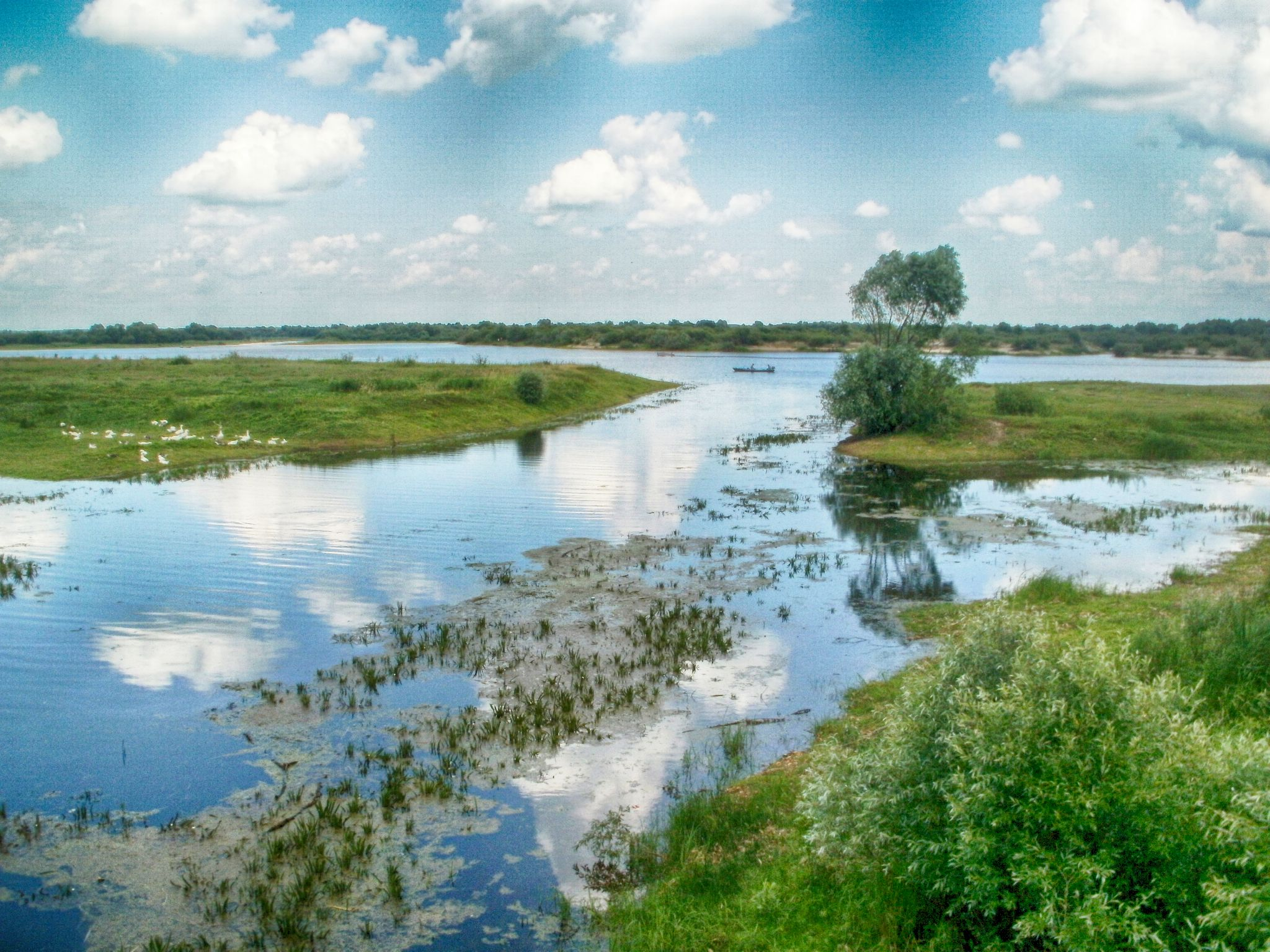 Беларуская (тарашкевіца): Прыпяць ля замчышча старажытнага Турава